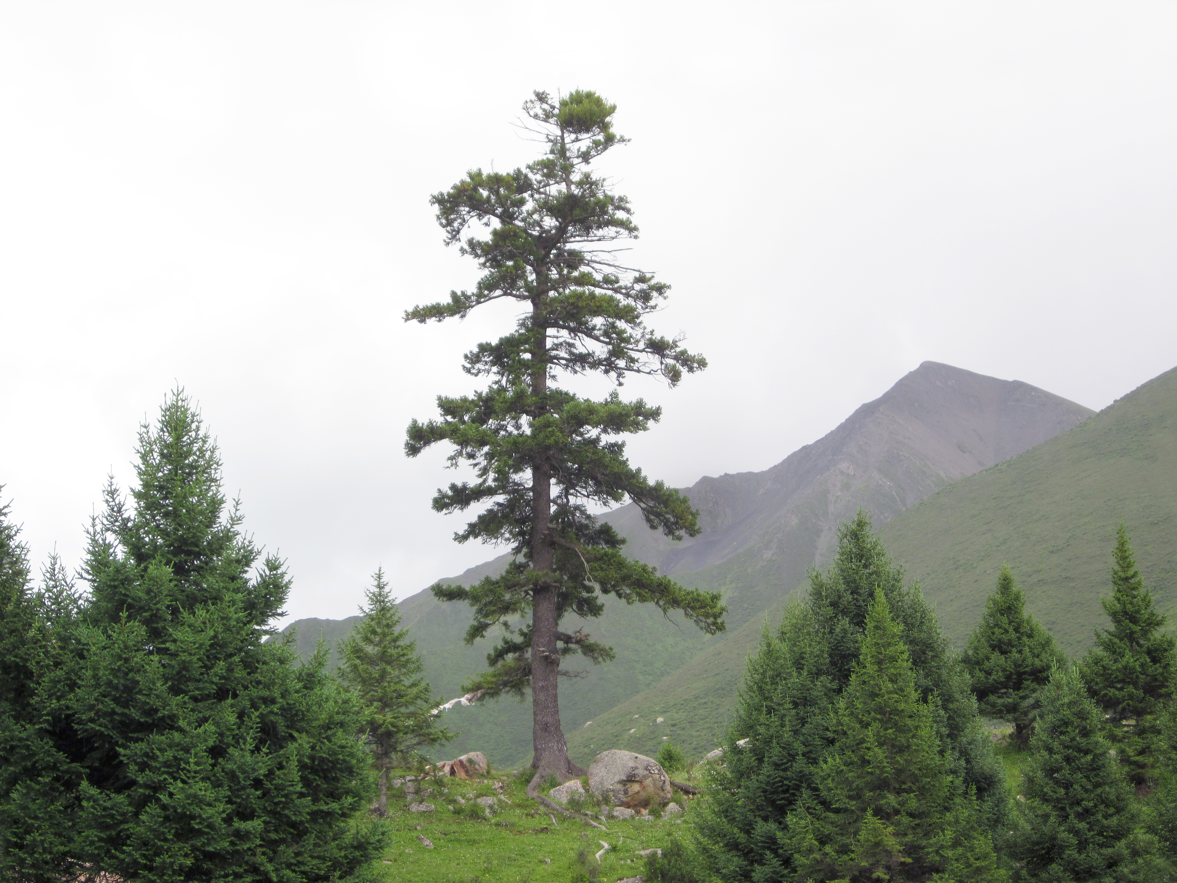 Picea purpurea (Purple-cone Spruce) old and young trees, Ganzi Zangzu, Sichuan, China; c. 4,025 m altitude.